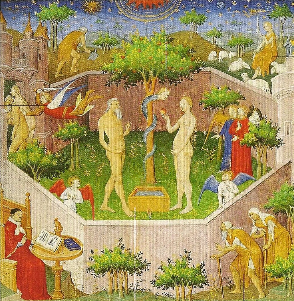 Die Geschichte von Adam und Eva